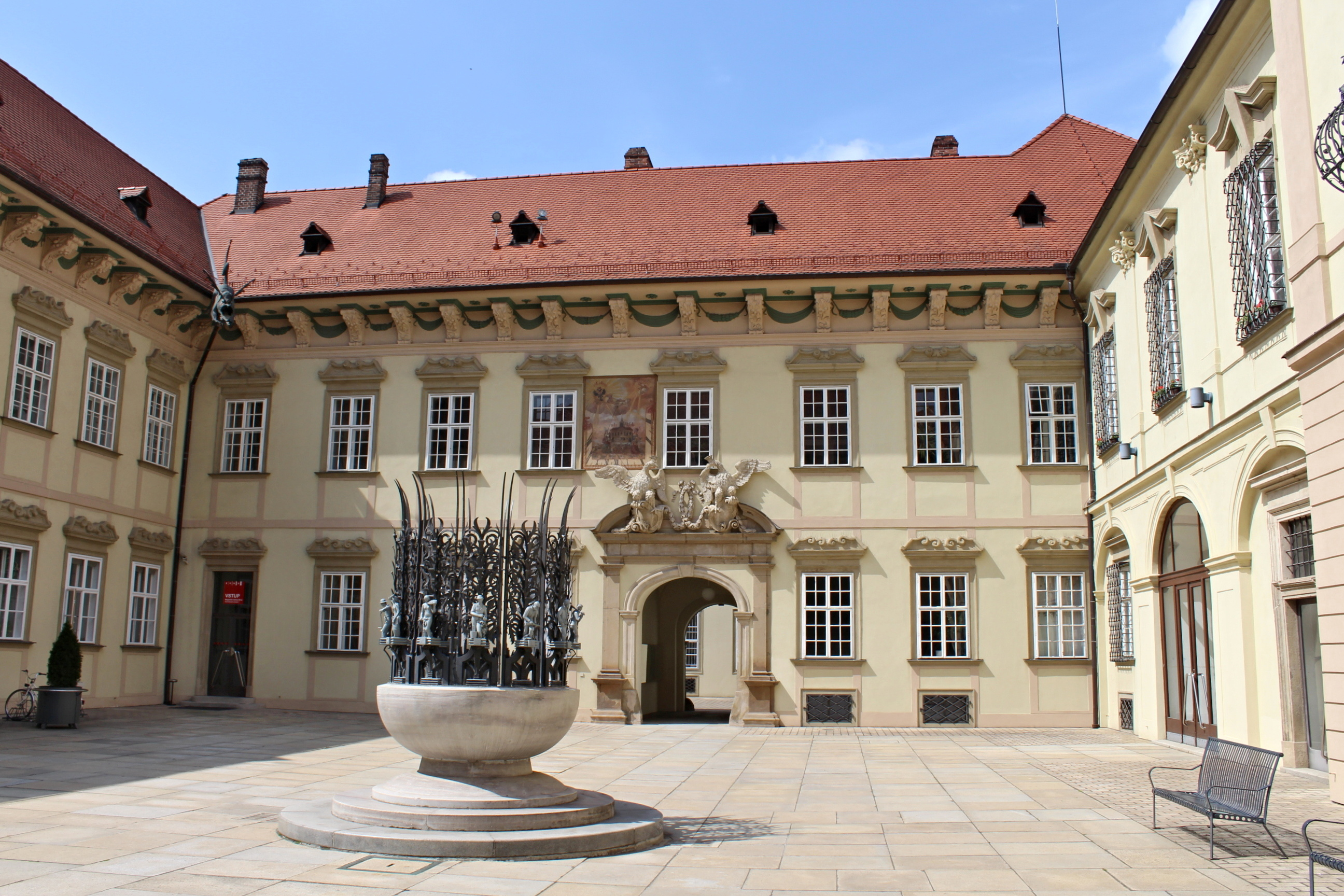 Nová radnice v Brně